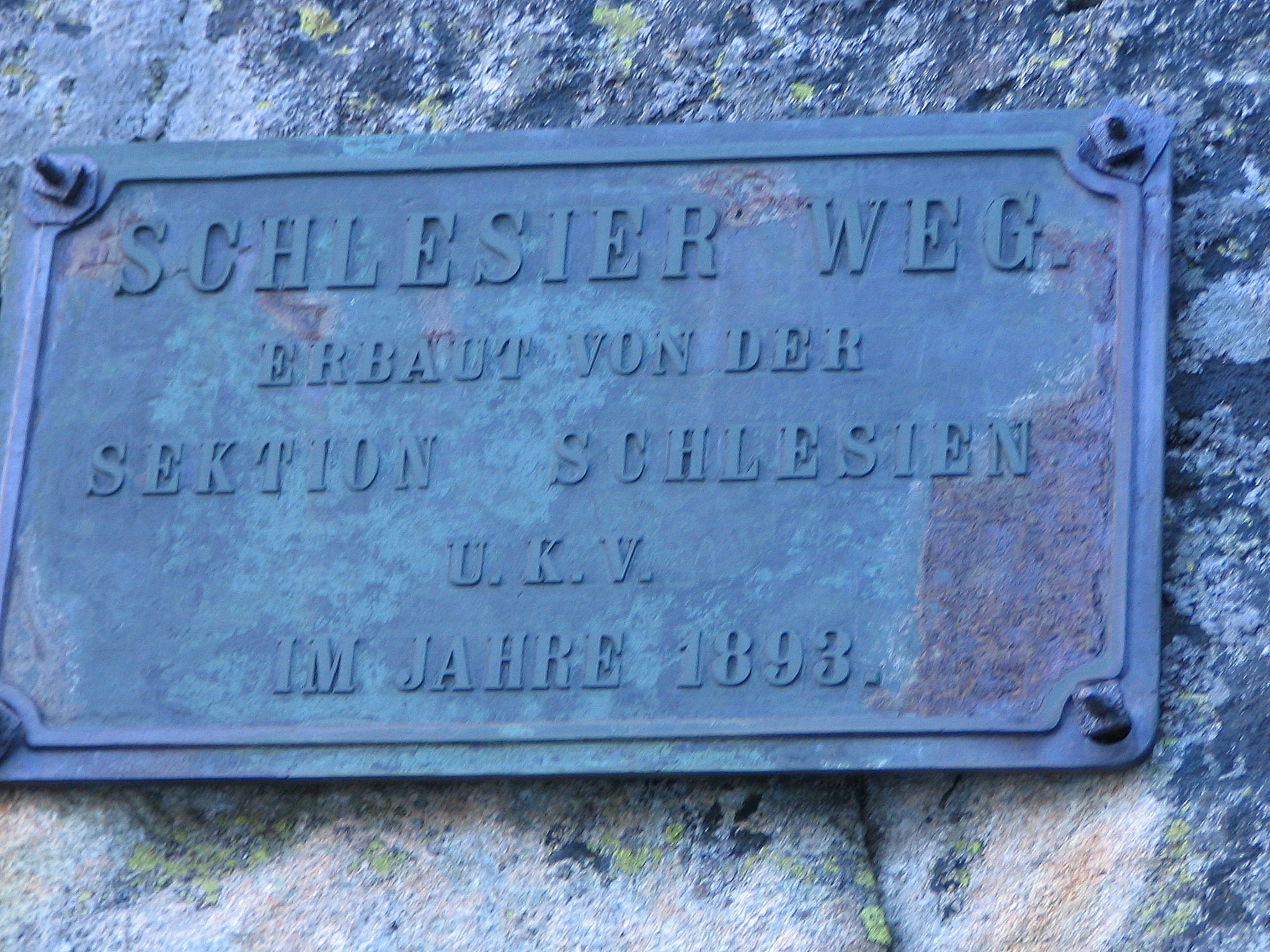 Tabliczka upamiętniająca wybudowanie Szlaku Śląskiego w Dolinie Wielickiej przez sekcję Śląską UKV, która miała swoją siedzibę we Wrocławiu.